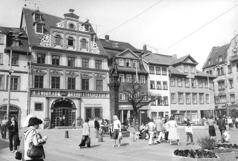 ADN-ZB-Ludwig-11.6.1982-Erfurt: Blick auf die Gebäude an der Westseite des Fischmarktes im Zentrum der Altstadt mit dem "Haus zum roten Ochsen" (Bildmitte). 1562 erbaut, war es zunächst im Besitz eines Waidhändlers und Oberratsmeisters, später gehörte es einem Kauf- und Handelsmann, 1977-78 erfolgte der Ausbau als Kunstausstellungshalle, in der heute die "Galerie am Fischmarkt" untergebracht ist."